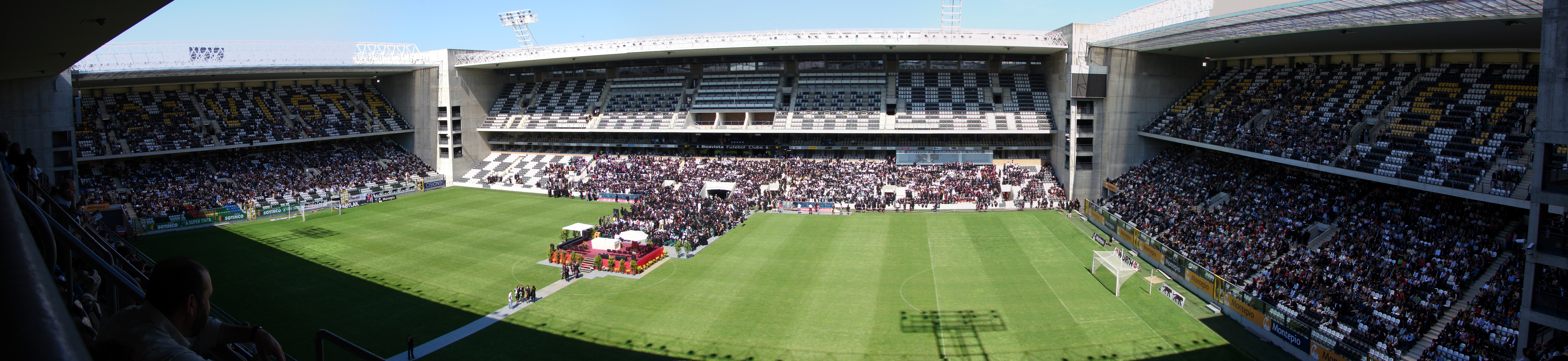 Foto panorãmica do estádio do Bessa (Boavista FC) durante a missa da benção das pastas da queima das fitas, do Porto, 2007 Tive que pedir a 30000 pessoas para ficar quietinhas enquanto tirava as fotos ;)